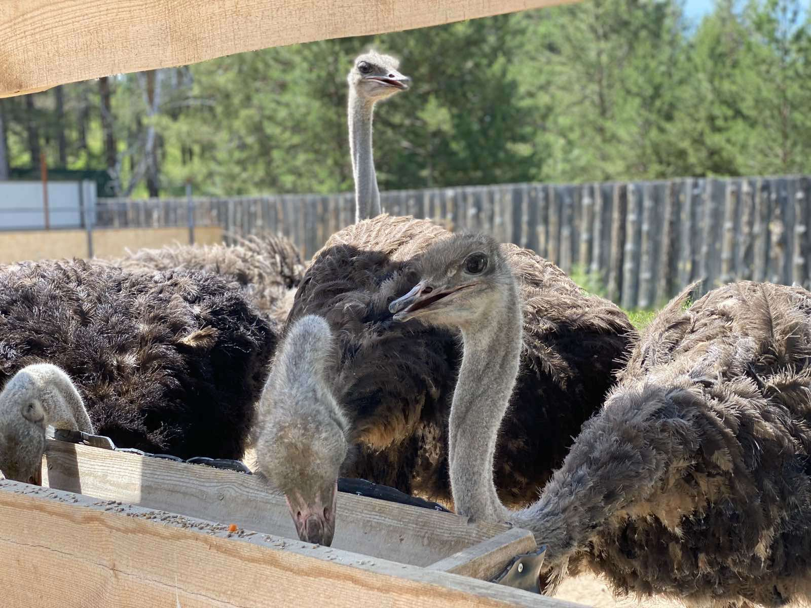 Страусы на ферме в Восточной Сибири, Россия